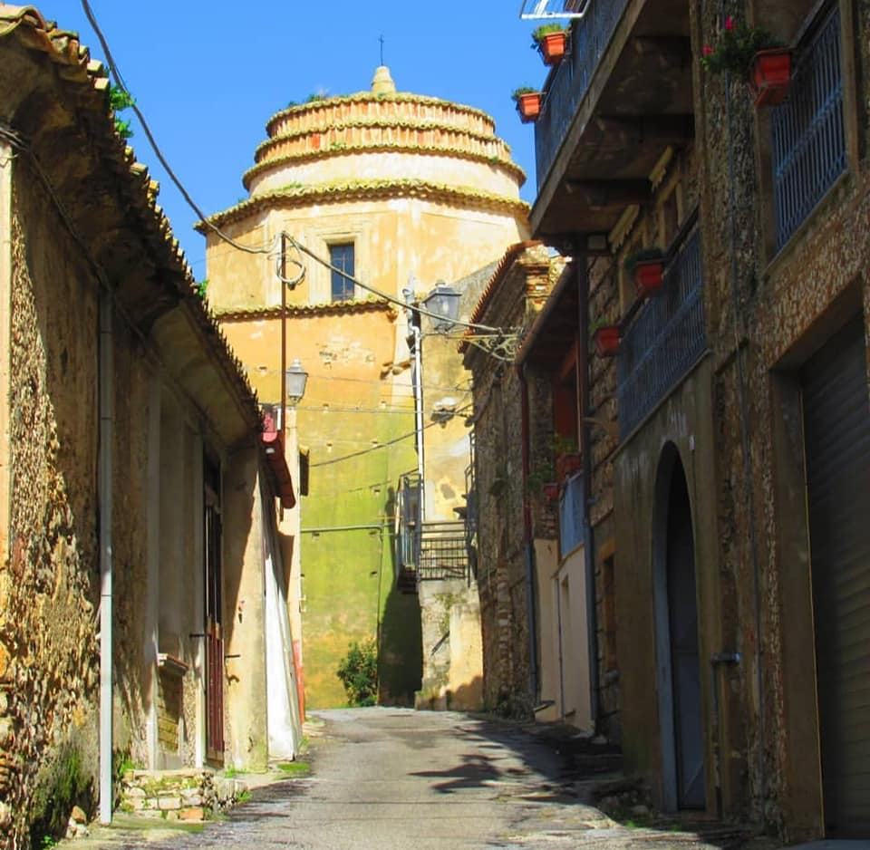 Scorcio del centro storico di Cropani. In fondo la Chiesa di San Giovanni